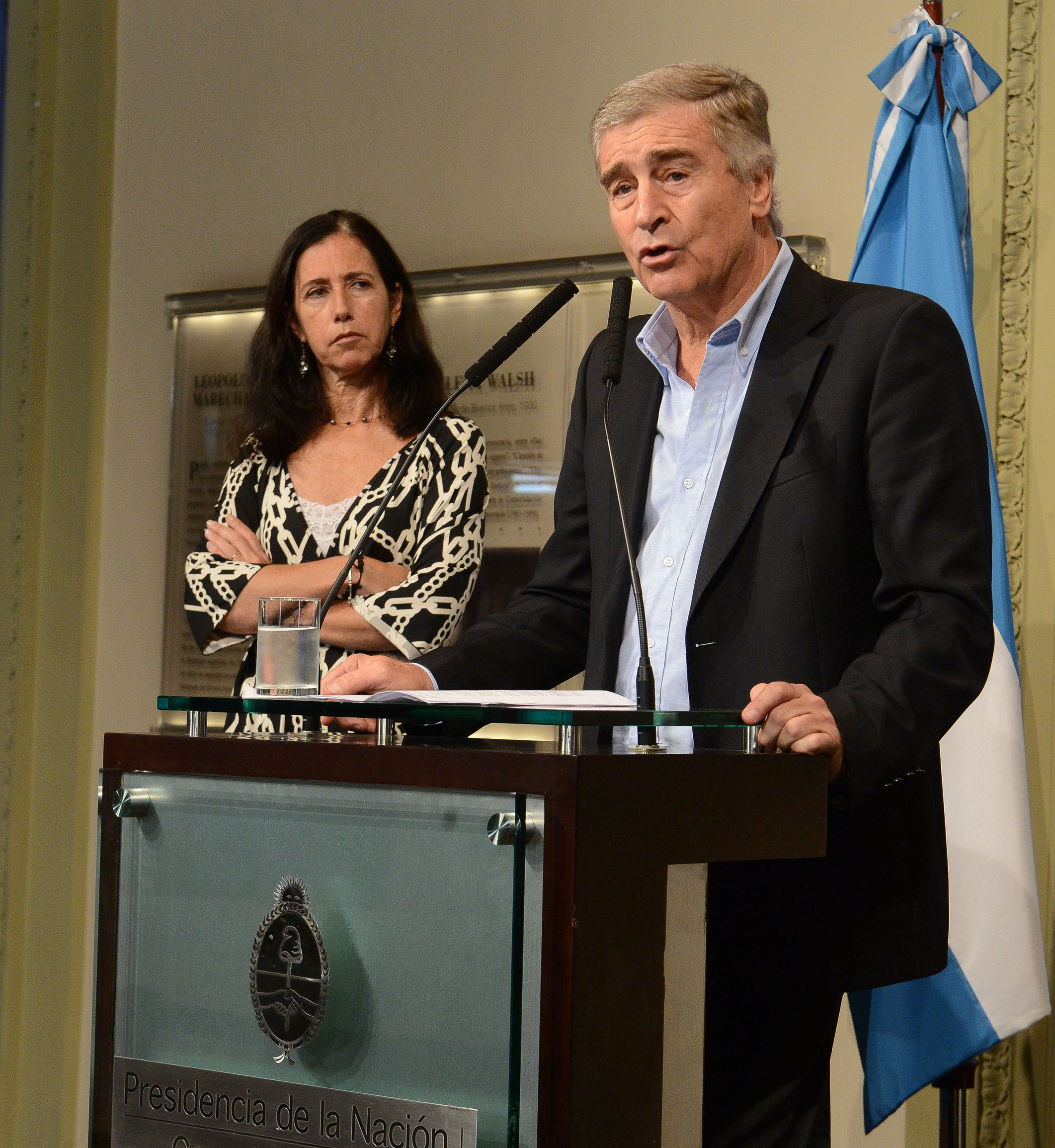 El ministro de Comunicaciones, Oscar Aguad, anunció la intervención a la Autoridad Federal de Servicios de Comunicación Audiovisual (AFSCA) y a la Autoridad Federal de Tecnologías de la Información y las Comunicaciones (AFTIC). Al respecto, el ministro especificó que “ambos organismos y sus autoridades no responden a la nueva estructura orgánica de la Ley de Ministerios”.